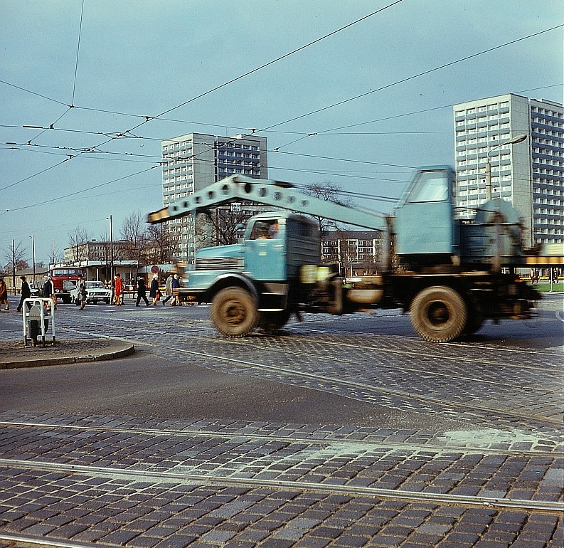 Original image description from the Deutsche FotothekFahrzeugscheiben